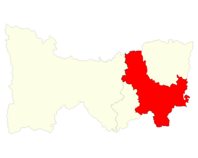 Localisation du district d'Ambositra dans la région Amoron'i Mania